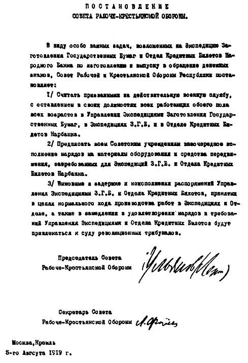 Постановление Совета Рабочей и Крестьянской Обороны от 5 августа 1919 года.